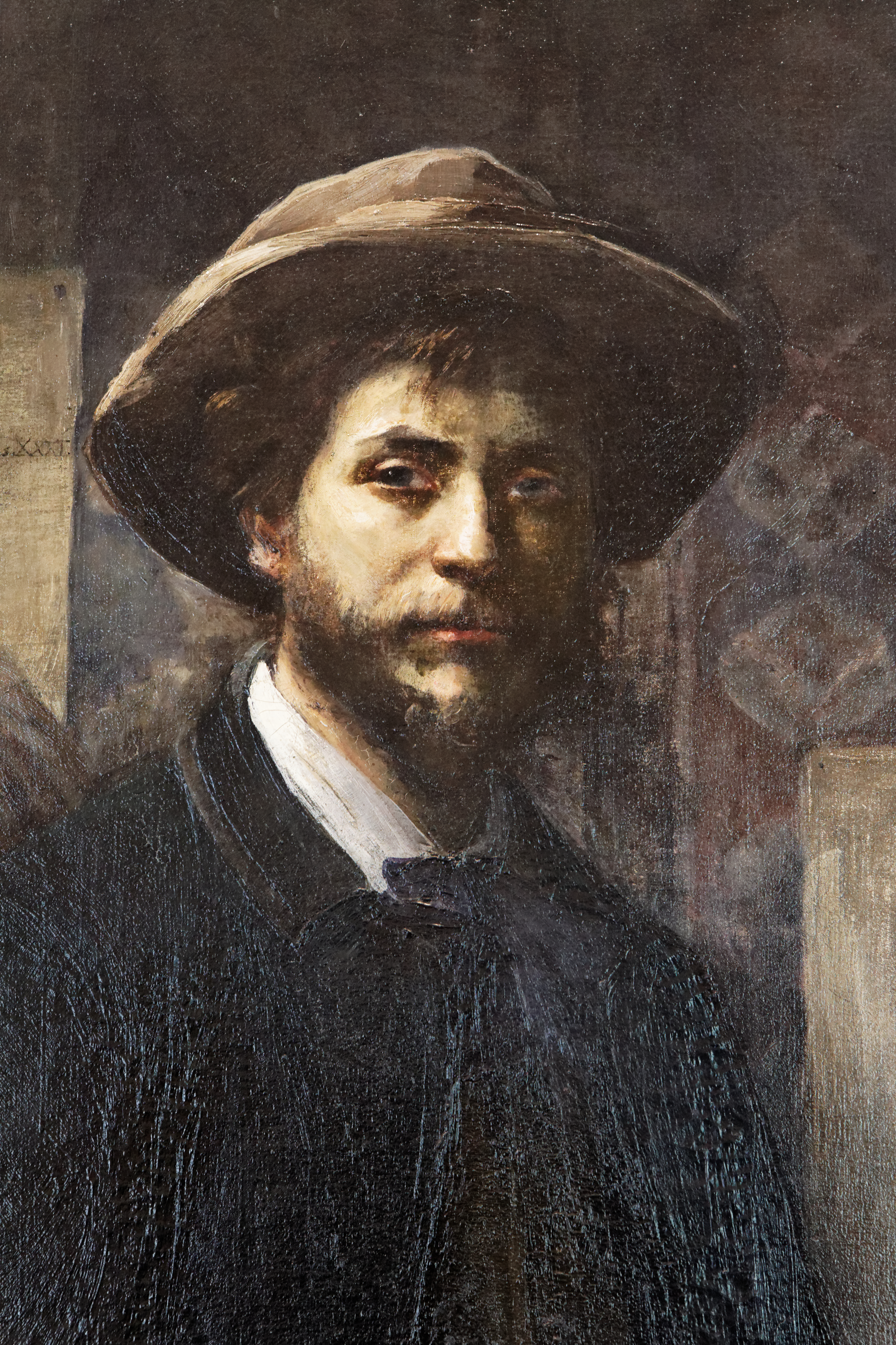 detail